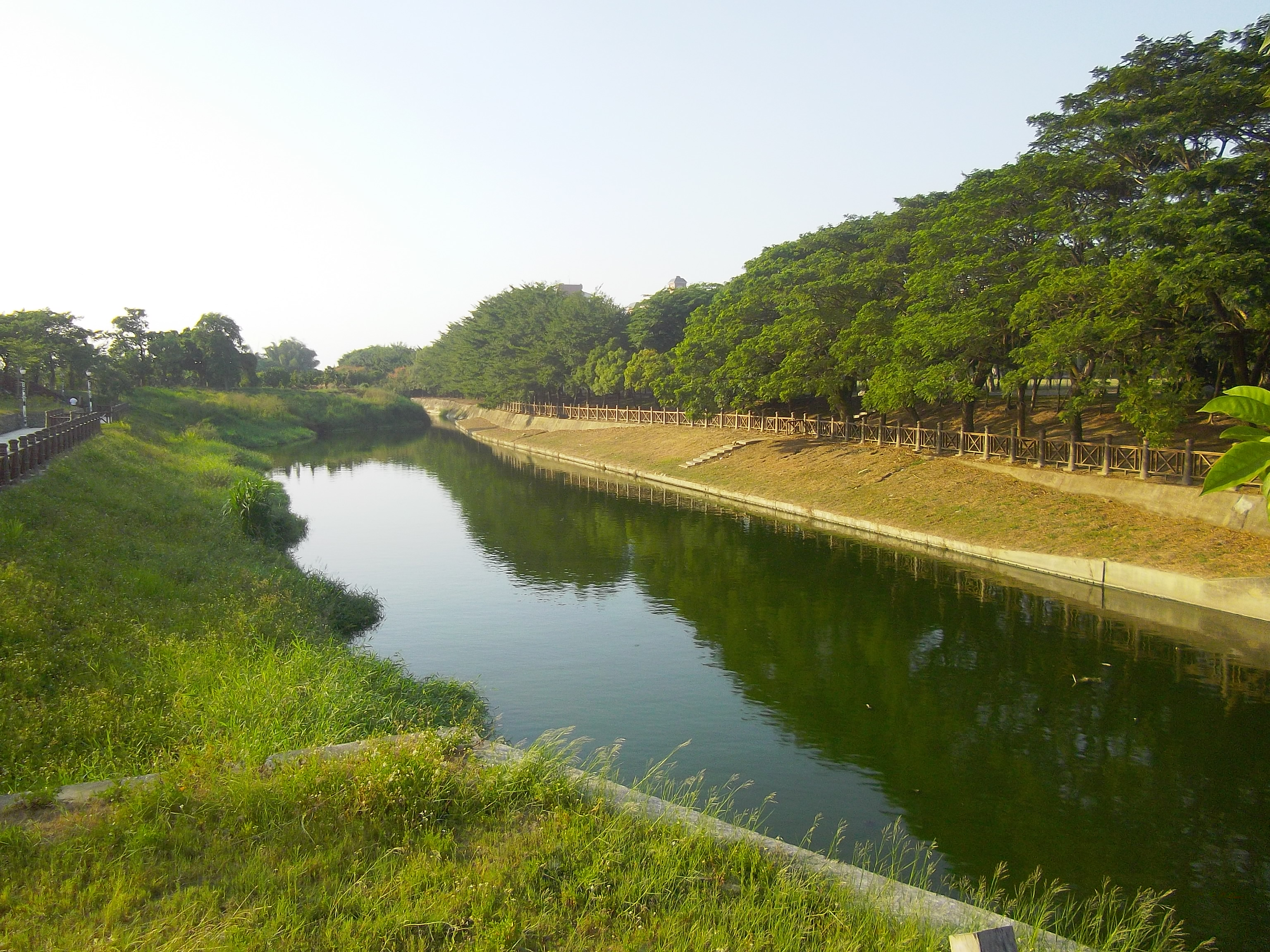 麻豆古港古航道